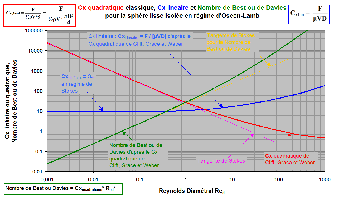 Nombre de Best ou de Davies, Cx quadratique et Cx linéaire en Régime de Stokes étendu